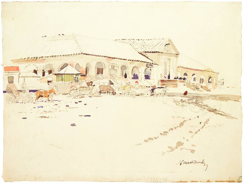 Zajazd w Białej Cerkwi na Ukrainie Ok. 1876-1880. Ołówek i akwarela na papierze. 22,5 x 33 cm. Muzeum Narodowe w Krakowie.